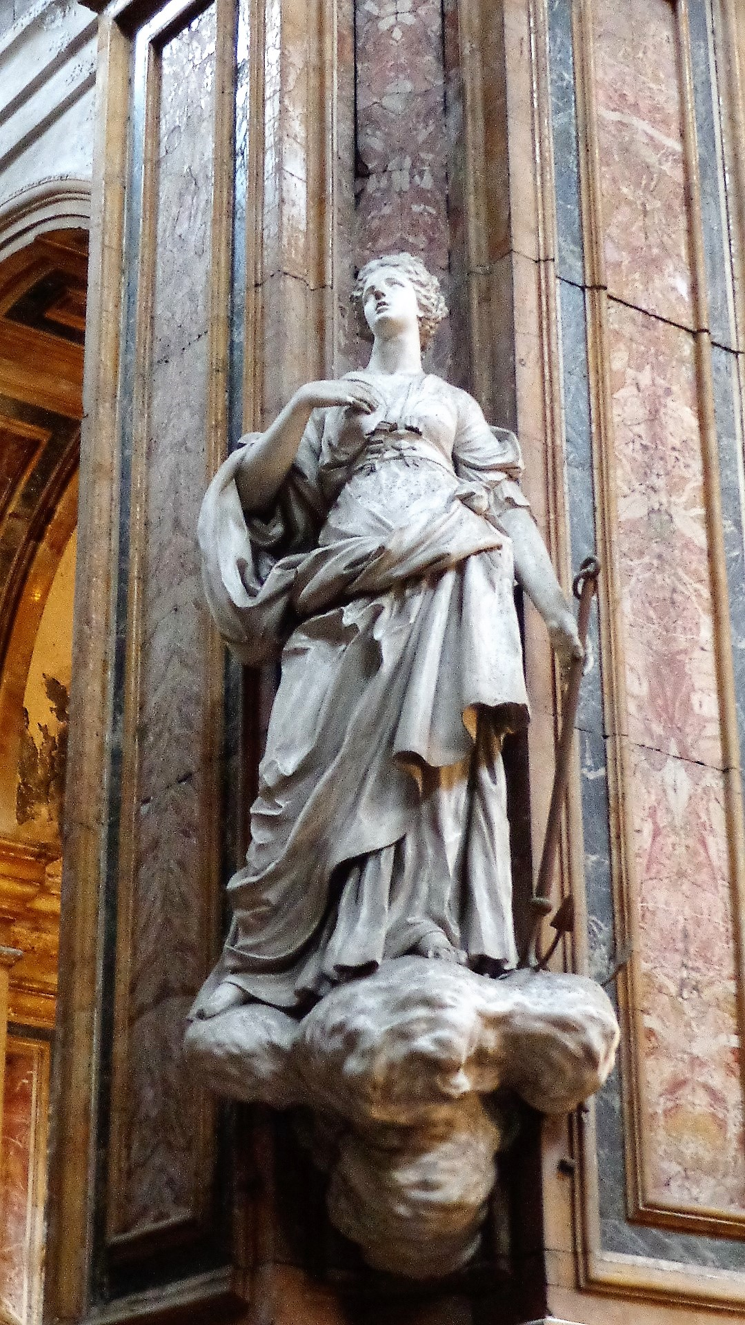 Statua in stucco Speranza pilastro della crociera.